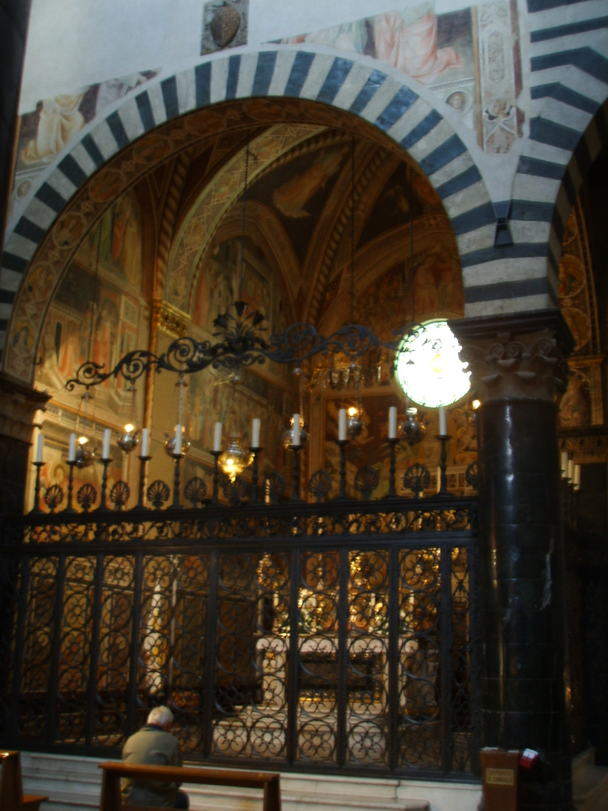 Duomo, Cappella del Sacro Cingolo, frescos by Agnolo Gaddi, Prato, Italy